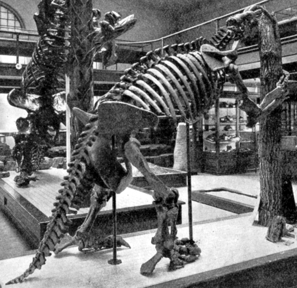 Megalonyx jeffersoni'